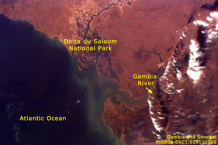 Photo satellite NASA du delta du Saloum (Sénégal) et fleuve Gambie